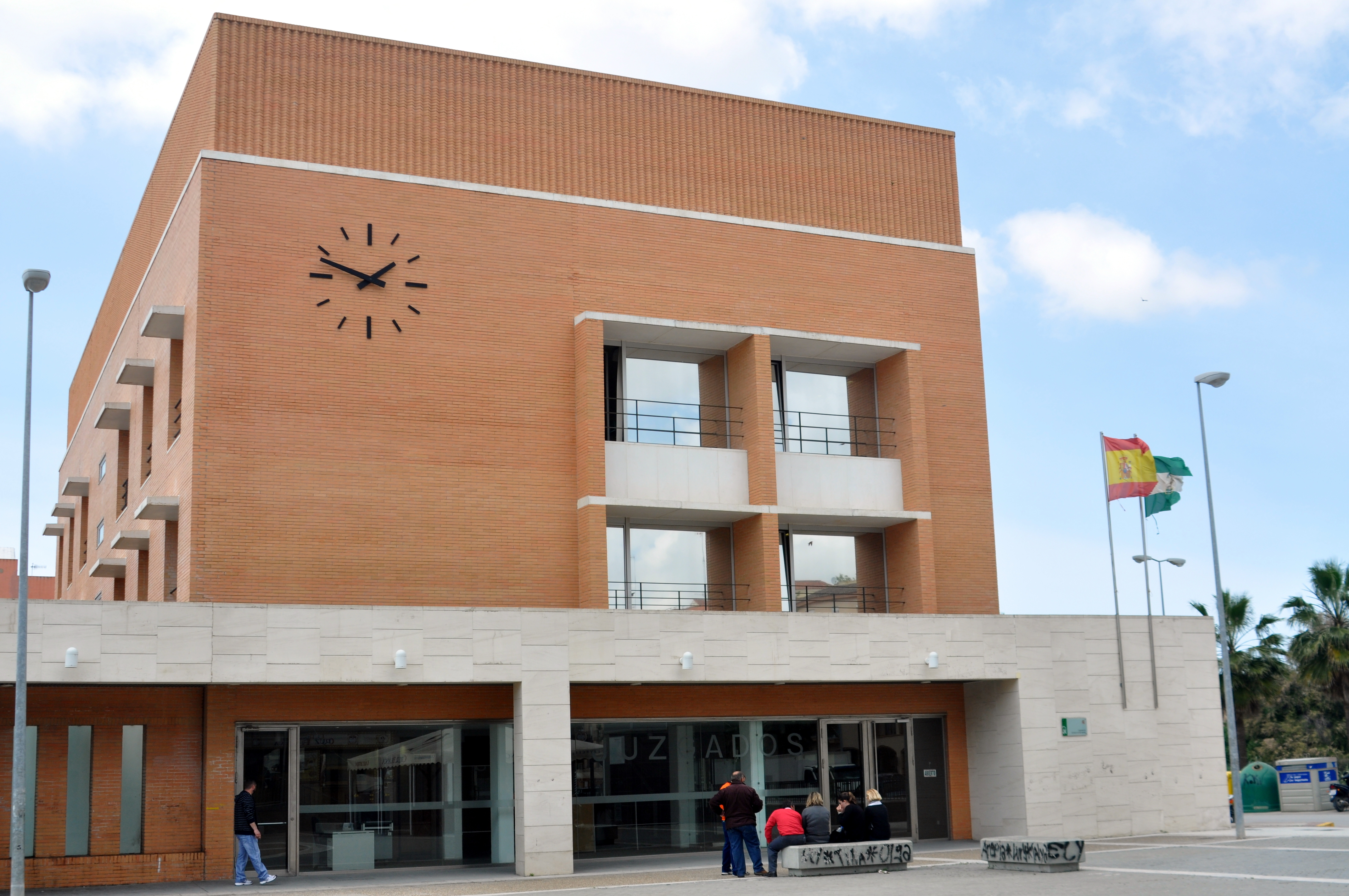 Juzgados de Sanlúcar de Barrameda (provincia de Cádiz, España).